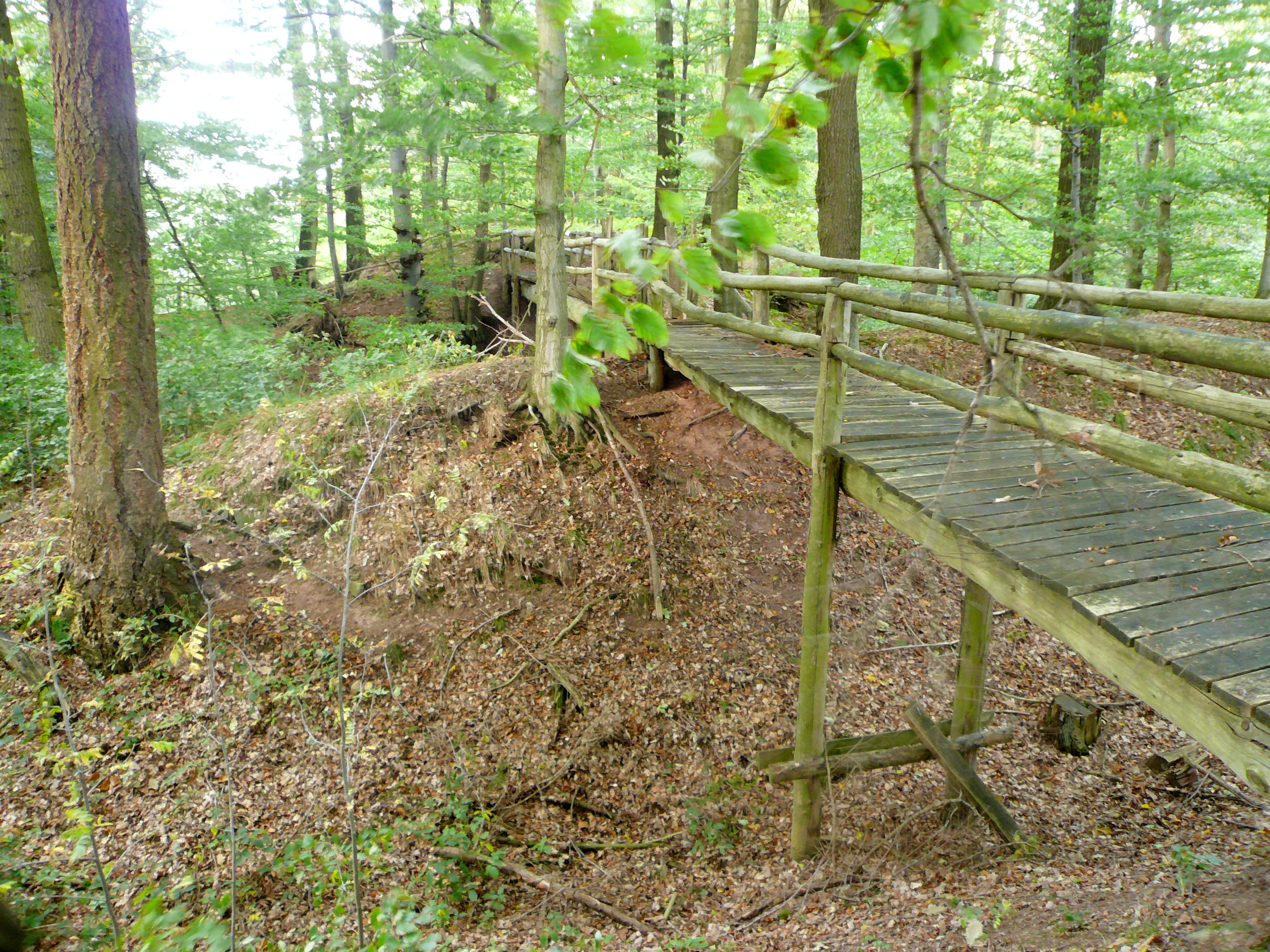 Turmburg bei Trögen / Ludwigshöhe über dem Espoldetal, Blick von Süden über die beiden Gräben zum Burgplateau